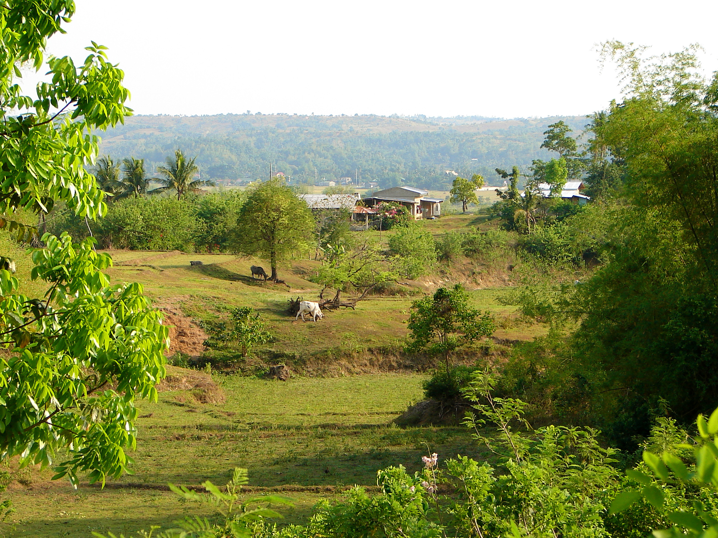 Mabini, Pangasinan, Philippines